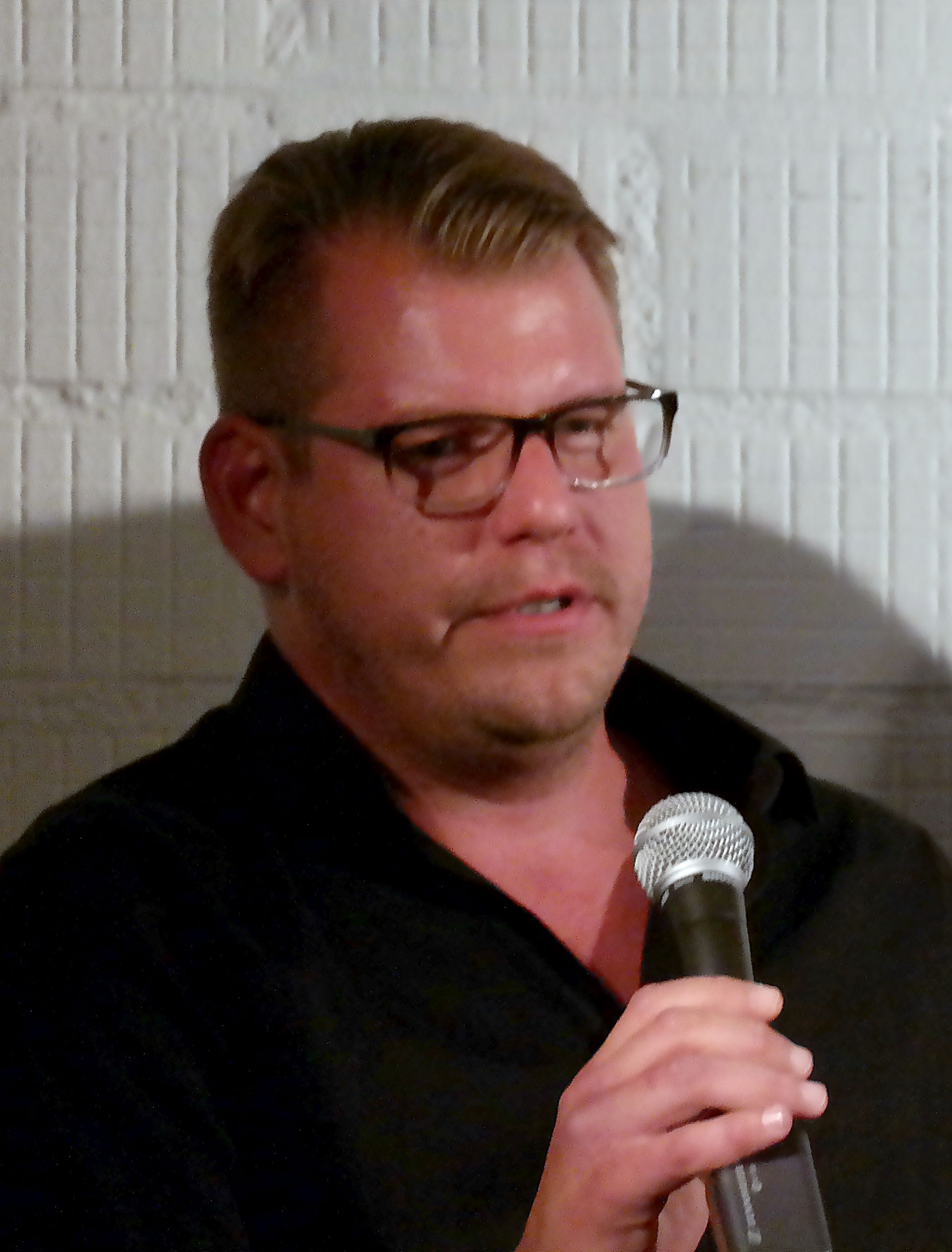 Bodó Viktor 2016-ban (Budapesti Katona József Színház – Kantin. A második életmű című könyv bemutatója)